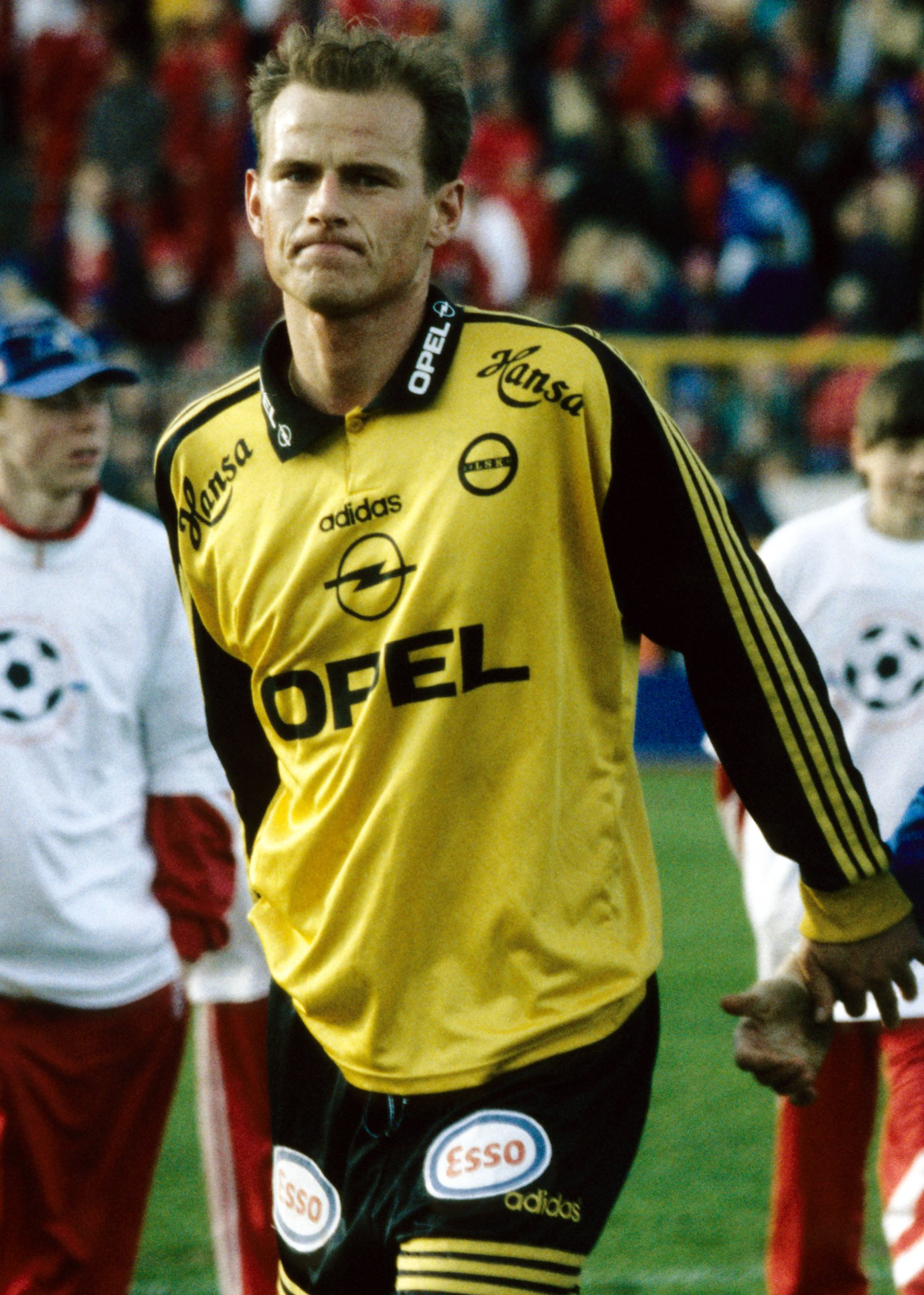 Ståle Solbakken som LSK-spiller